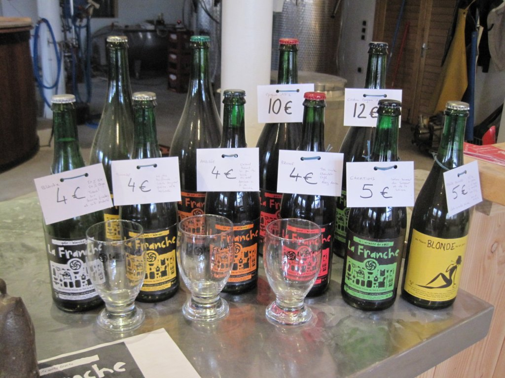 Série de Bière artisanale La Franche ( Jura France )